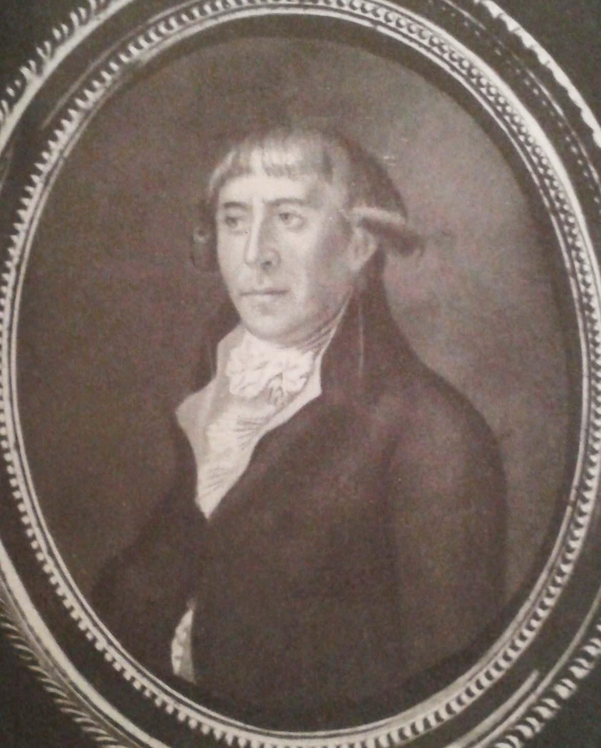 Portrait des deutschen Dichters Gottfried August Bürger (1747–1794). Nach einem Aquarell von Johann Dominik Fiorillo.